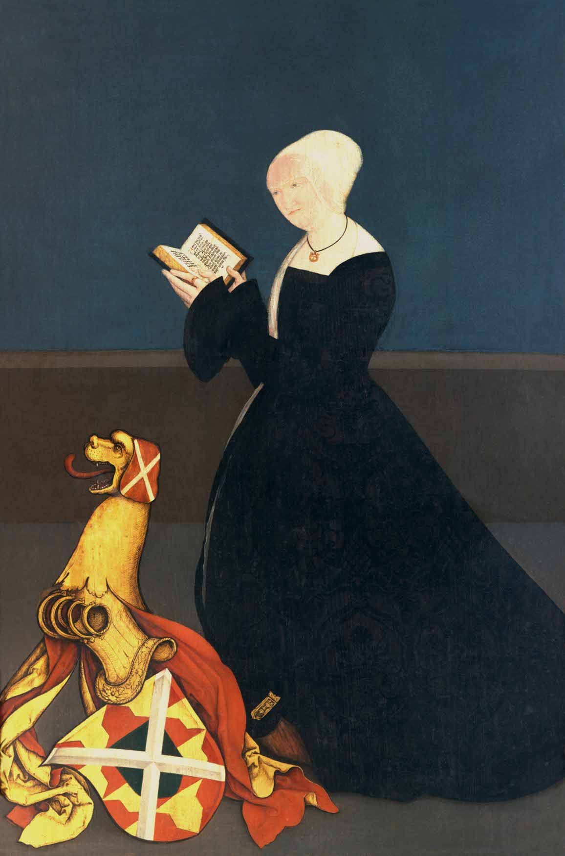 Porträt der Magdalena, Gräfin von Montfort, geb. von Öttingen